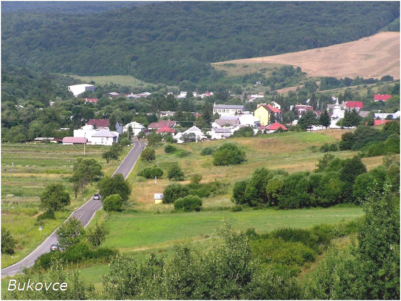 Celkový pohľad na Bukovce